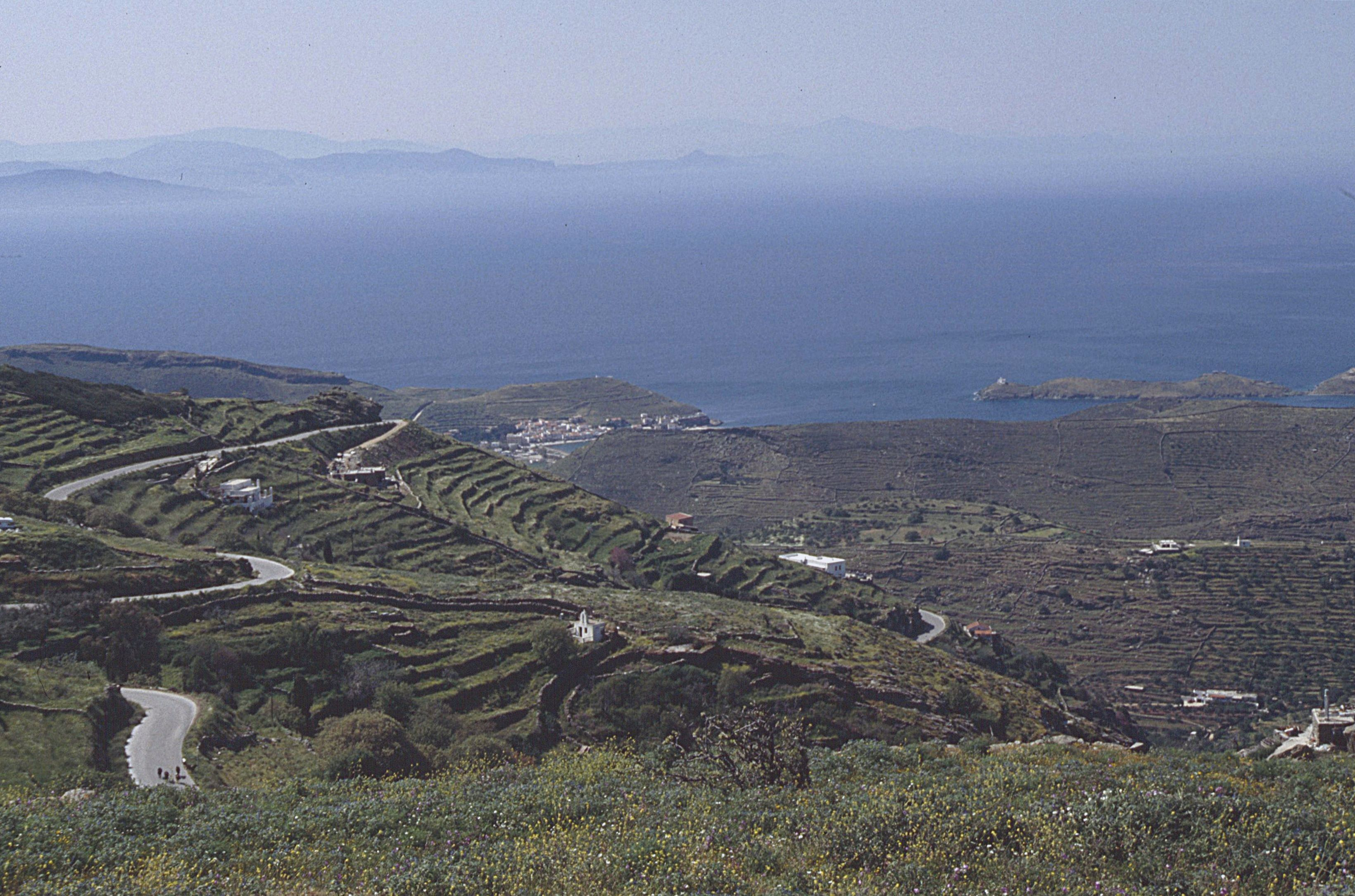 Blick über Korissia, den Hafen von Kea, auf Attika